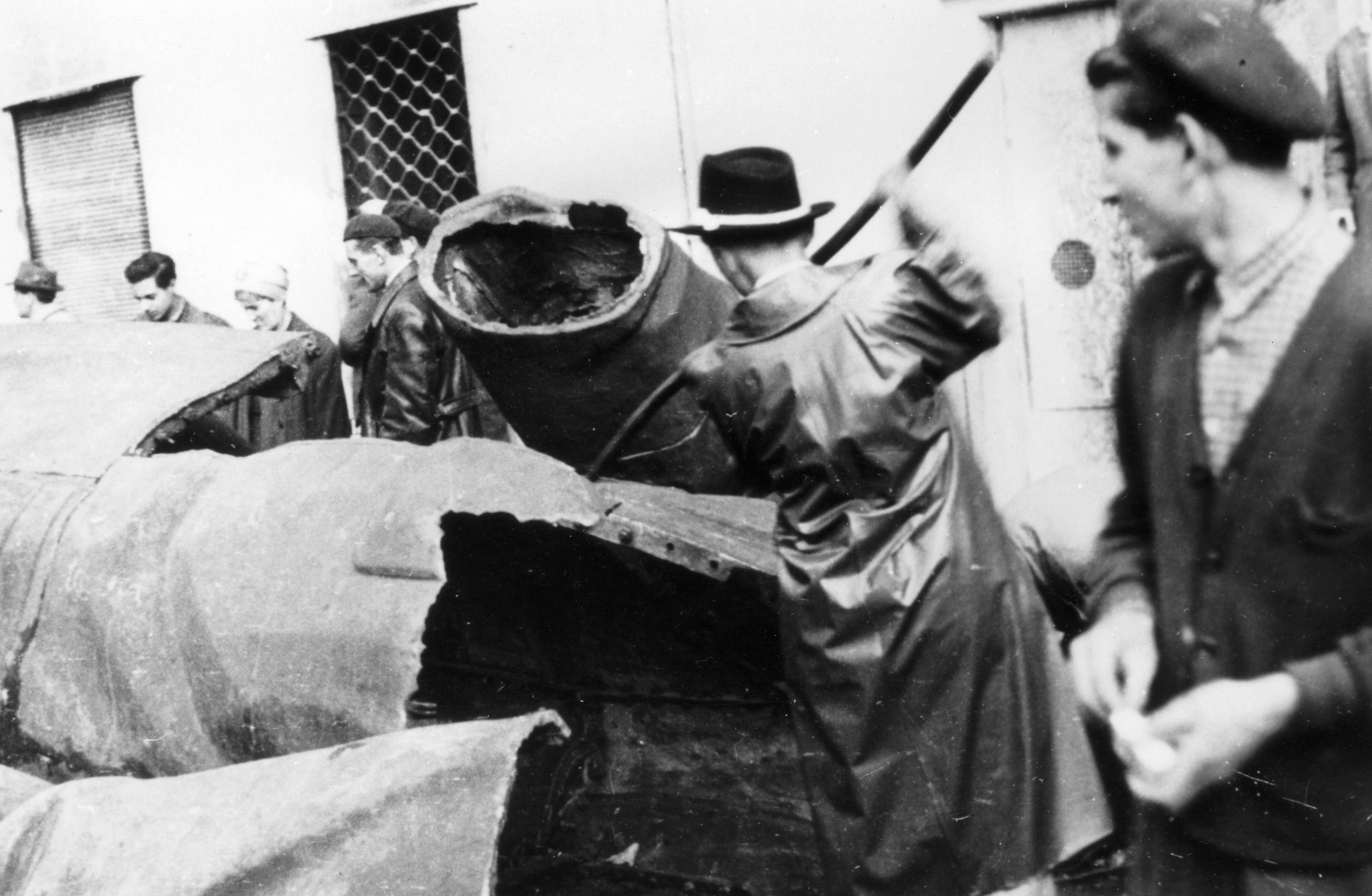 Akácfa utca, a Sztálin-szobor darabolása. Location: Hungary, Budapest VIII. Tags: revolution, destruction of symbols, pedestrian, sculpture, Budapest Title: Akácfa utca, a Sztálin-szobor darabolása.